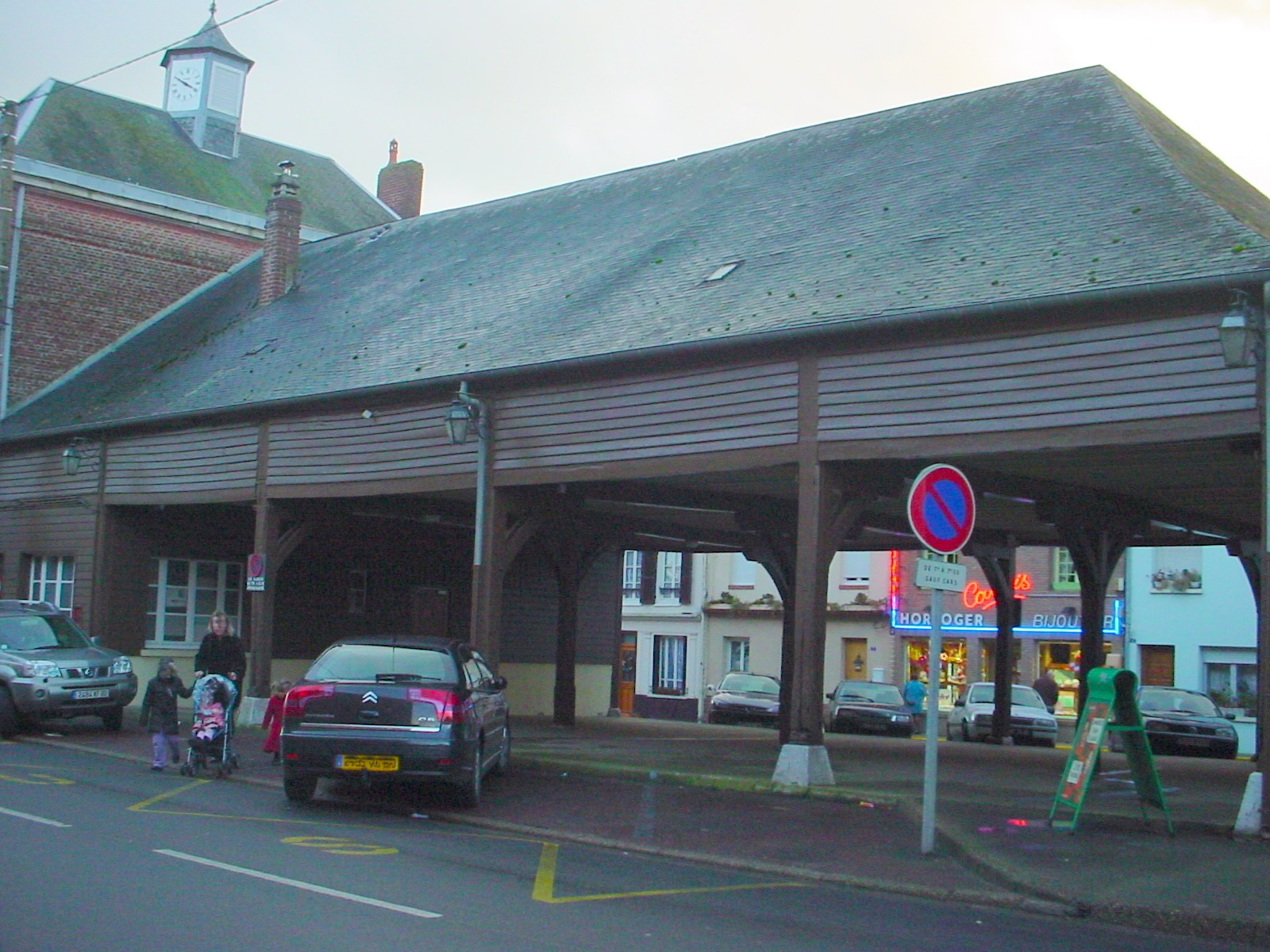 Halles d'Oisemont (Somme, France).